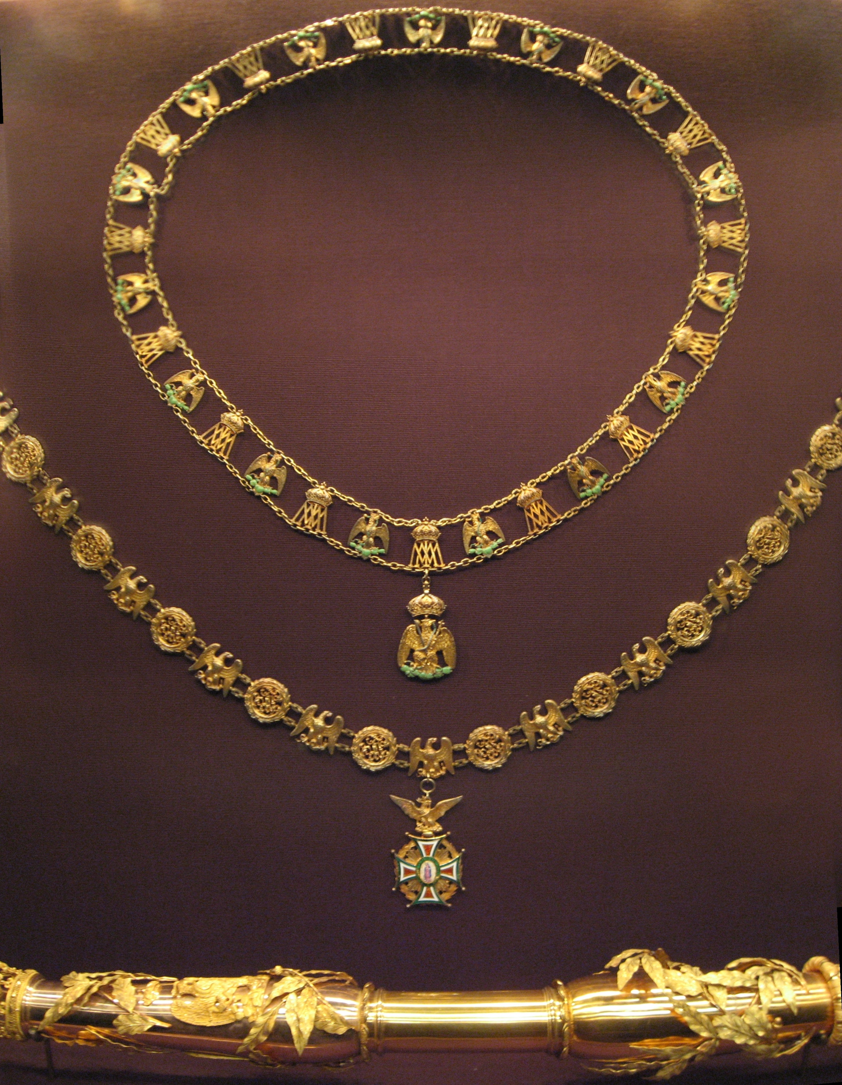 Außen: Collane des Ordens unserer Lieben Frau von Guadalupe. Wien (?), um 1864/1865. Silber vergoldet, teilweise emailiert. Inv. Nr. XIV IIb. Innen: Collane des mexikanischen Adlerordens. Wien, 1865. Silber vergoldet, teilweise emailiert. Inv. Nr. XIV IIa.